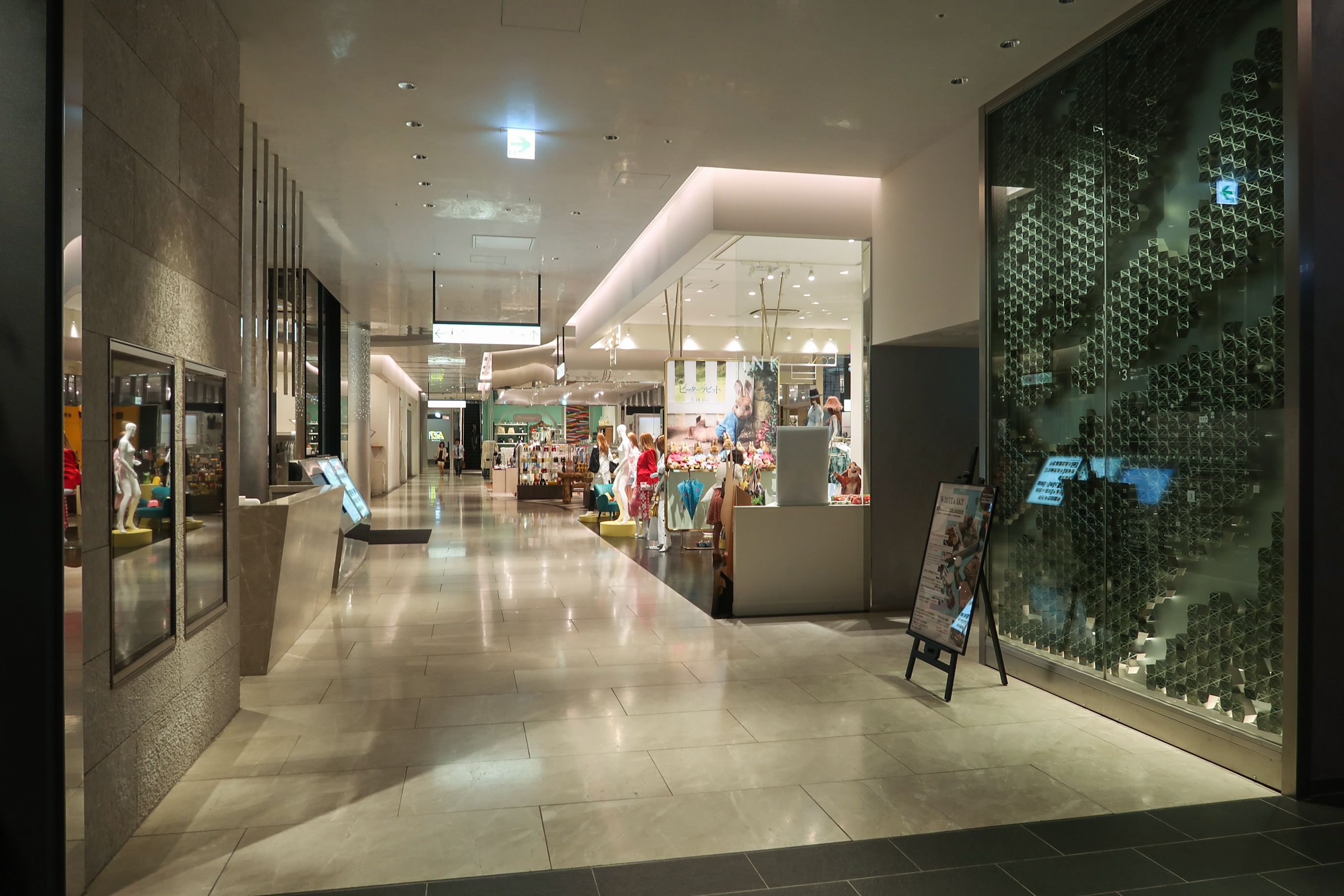 Tokyu Plaza Ginza Level 3